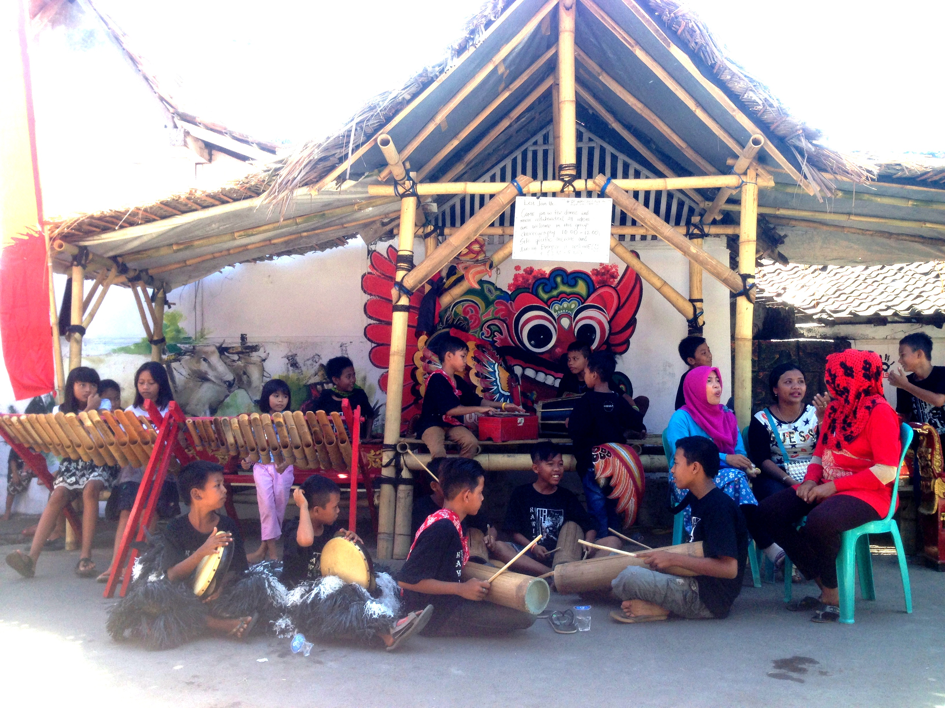 Suasana Kampong Wisata Temenggungan yang seringkali dipergunakan untuk aktivitas kesenian